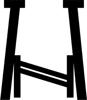 Tallinna Noorte Tegijate (TNT) logo